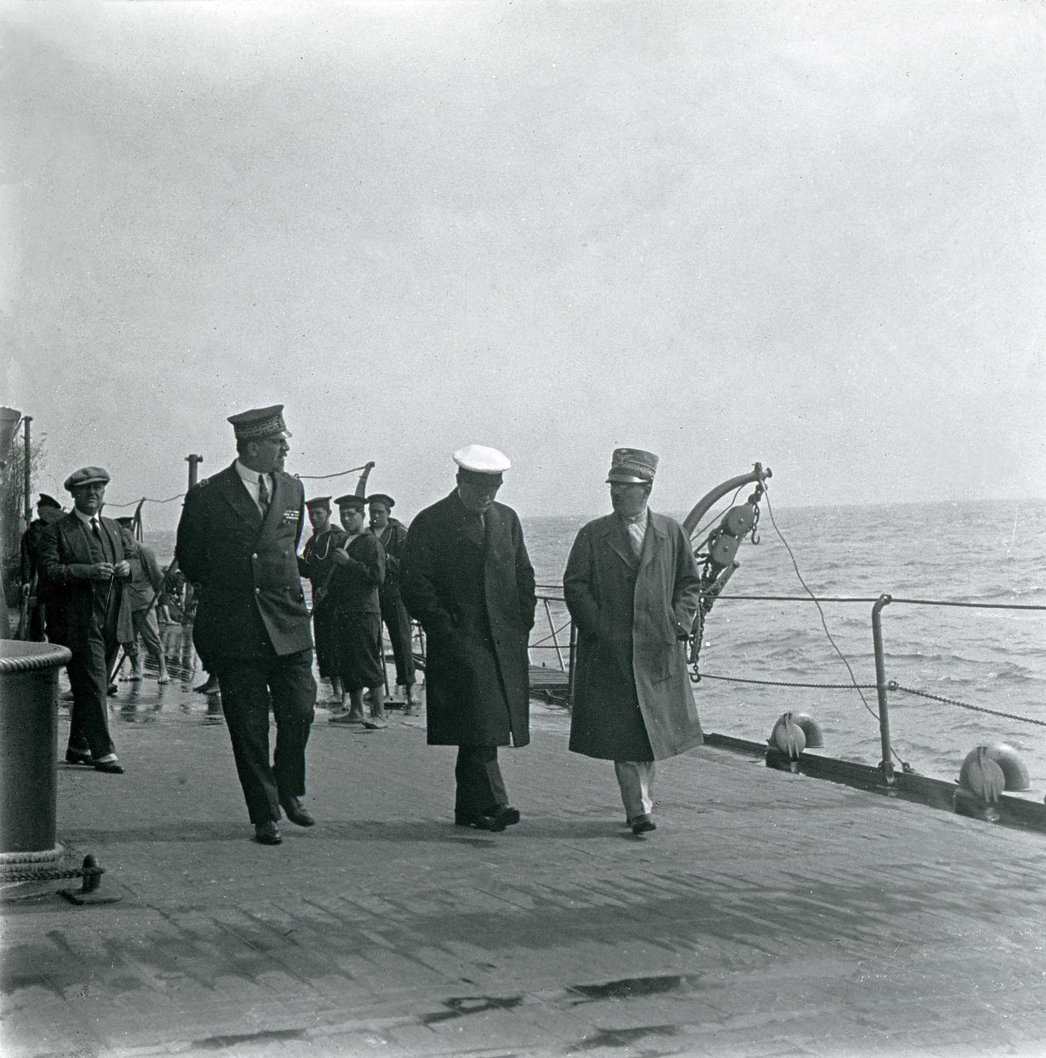 Viaggio di Mussolini in Libia. Il Duce passeggia sul ponte della règia nave “Cavour” in rotta verso Tripoli con il contrammiraglio comandante della nave ed un generale dello Stato Maggiore. In secondo piano, a sinistra, Manlio Morgagni (riproduzione tratta da un originale vetrino stereoscopico proveniente dal fondo fotografico “Manlio Morgagni” della Fondazione Luigi Micheletti).